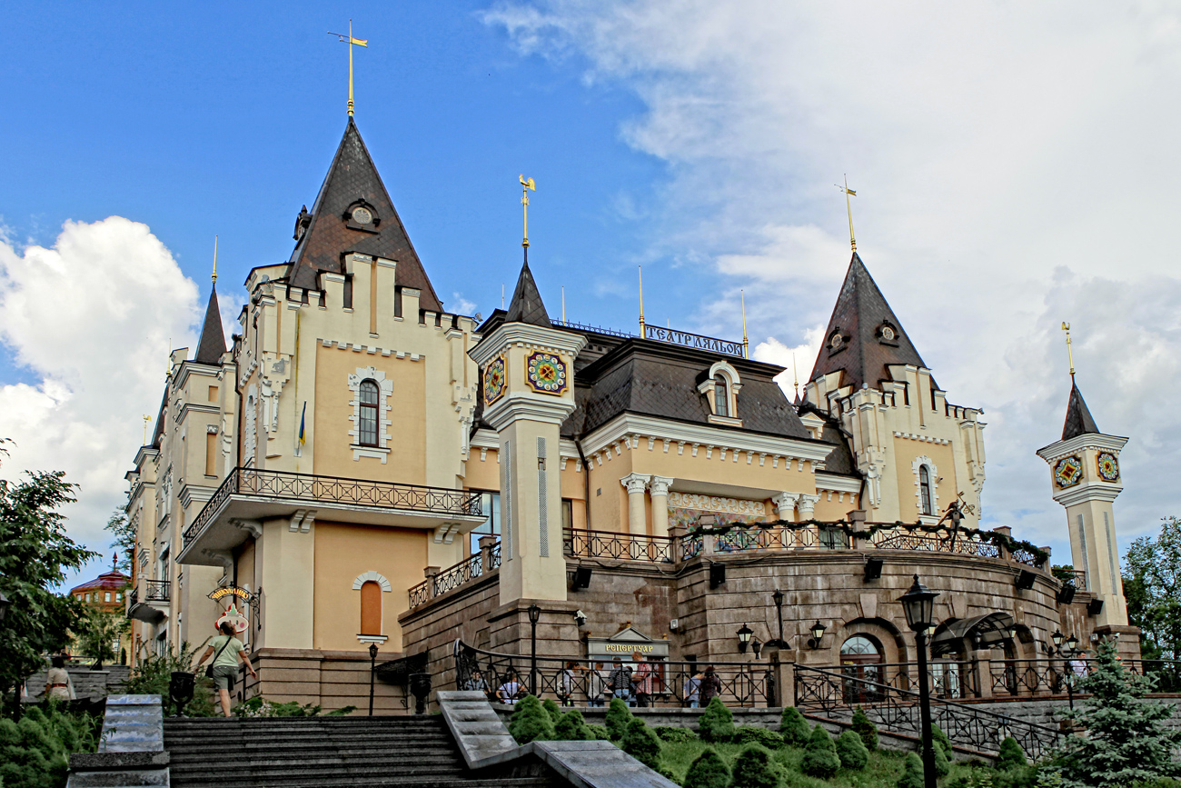 Кукольный театр